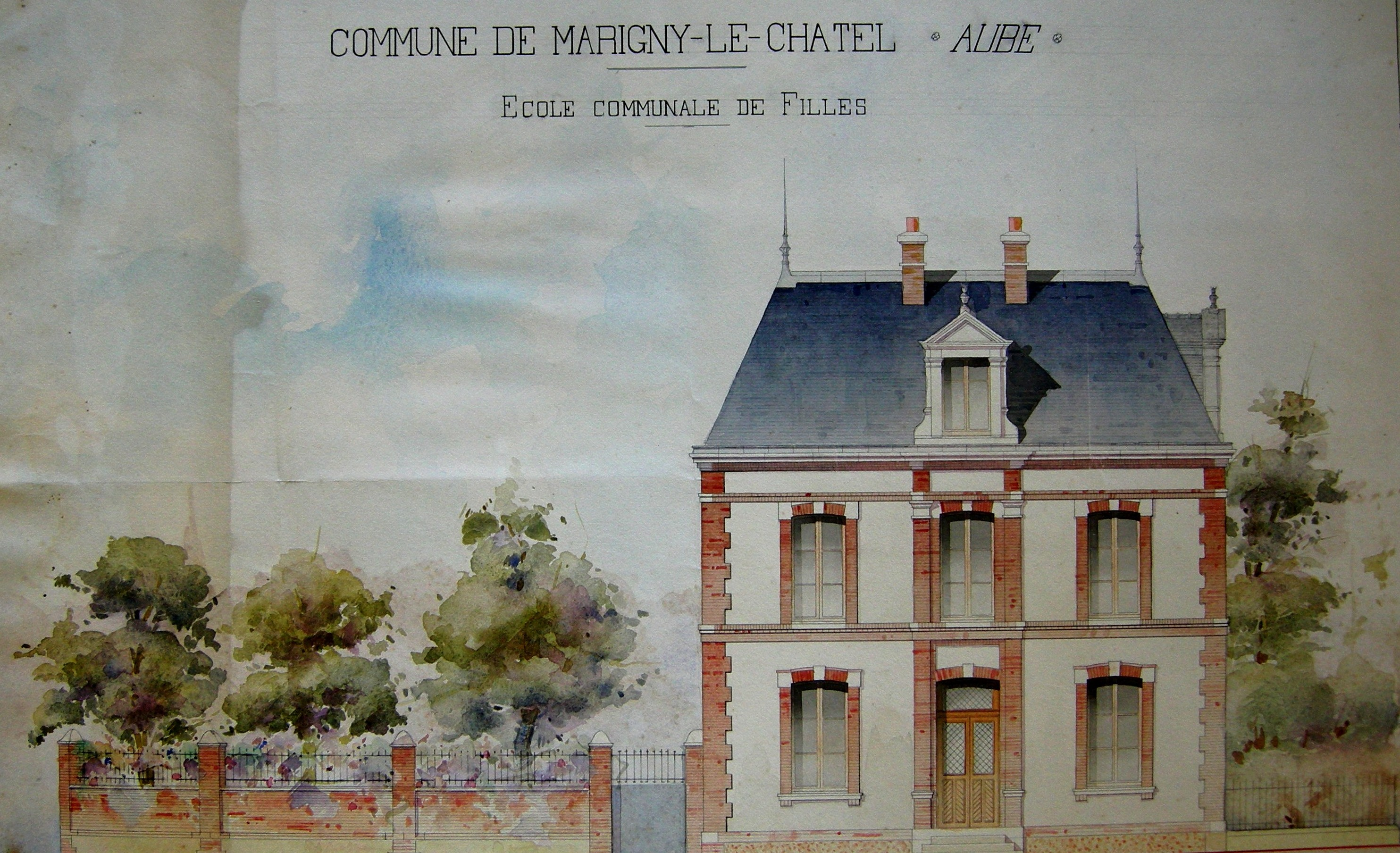 Aquarelle du projet de l'école de Marigny. D'autres plans de l'école datent de 1885.